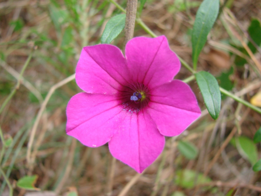 Petunia littoralis - SOLANACEAE - Praia do Sonho - Palho�a - SC - Brasil